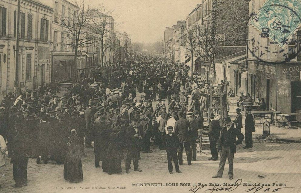 Montreuil-sous-Bois.Rue Saint-Mandé.Marché aux Puces